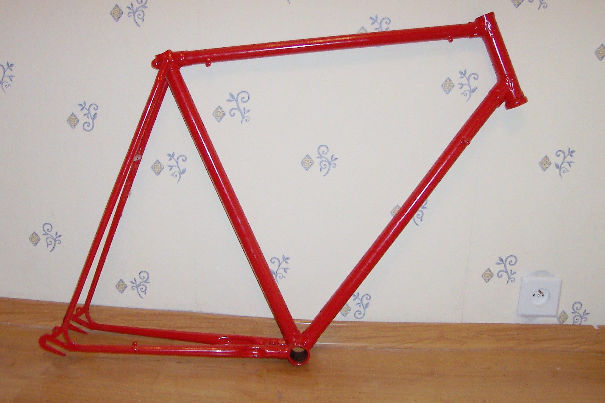 Colnago bicycle frame